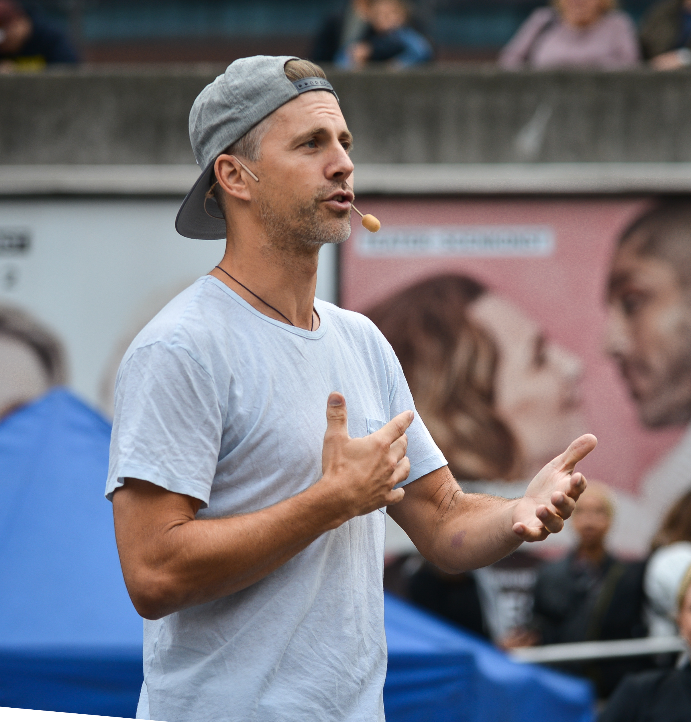 Fredrik Benke Rydman på Kulturhuset Stadsteaterns höstsamling på Sergels torg den 25 augusti 2018.